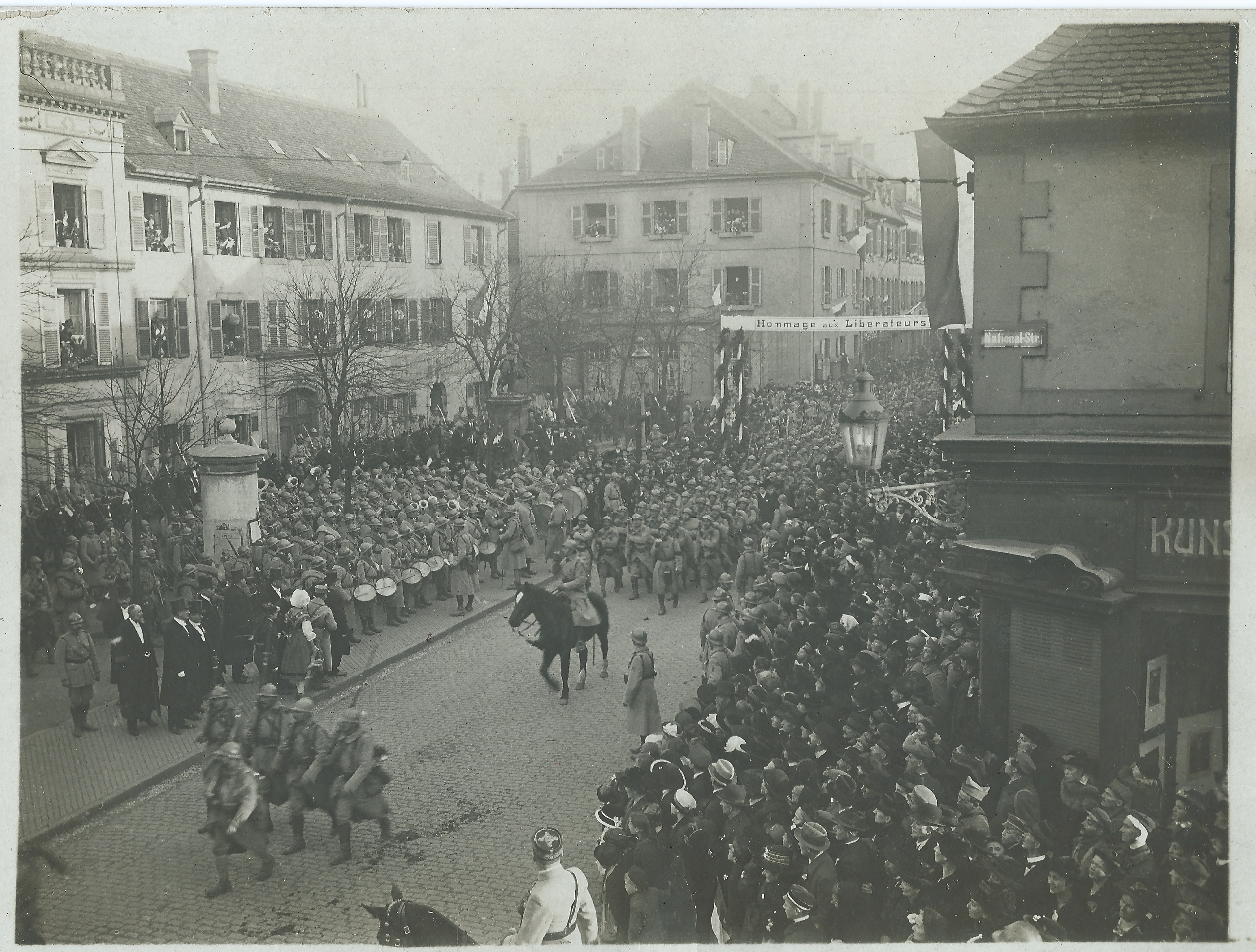 Photo-carte de la collection personnel de Louis Descols partagée et entièrement libre de droit. Celle-ci représente le défilé du 2e Bataillon du 66e régiment d'infanterie français, le 22 novembre 1918 à Sarreguemines. Derrière la garde du drapeau, à cheval, le colonel Soulé.